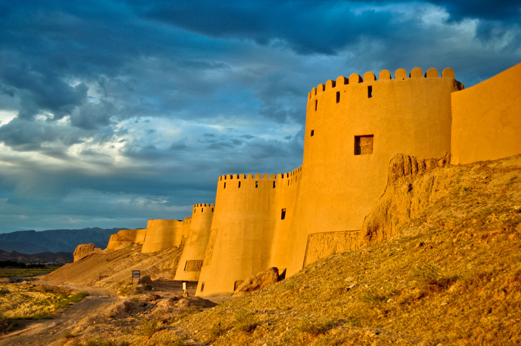 نمای غربی ارگ شهر تاریخی بلقیس اسفراین بعد از مرمت ، دید از غرب